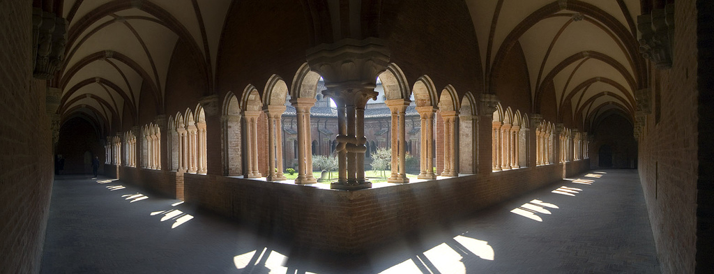 Abbazia di Chiaravalle della Colomba : interno chiostro / Chiaravalle della Colomba Abbey : Cloister